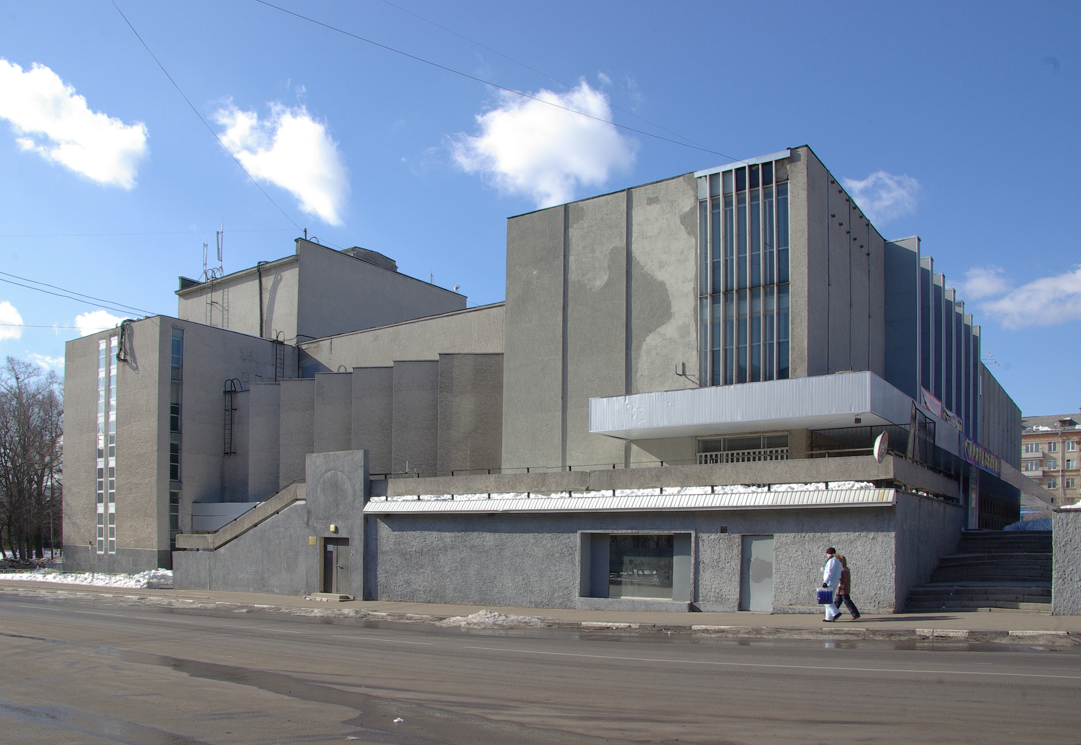 Москва, здание ДК Москворечье (1970)